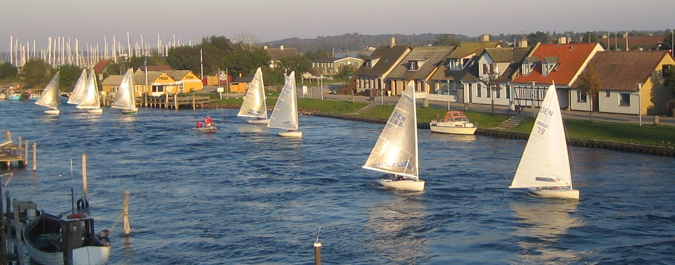 Ausschnitt aus Bild Image:IMG 1432.jpg Finn dinghies in Karrebæksminde, Denmark